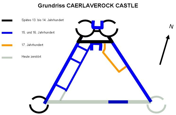 Schematisierter Grundriss Caerlaverock Castle.